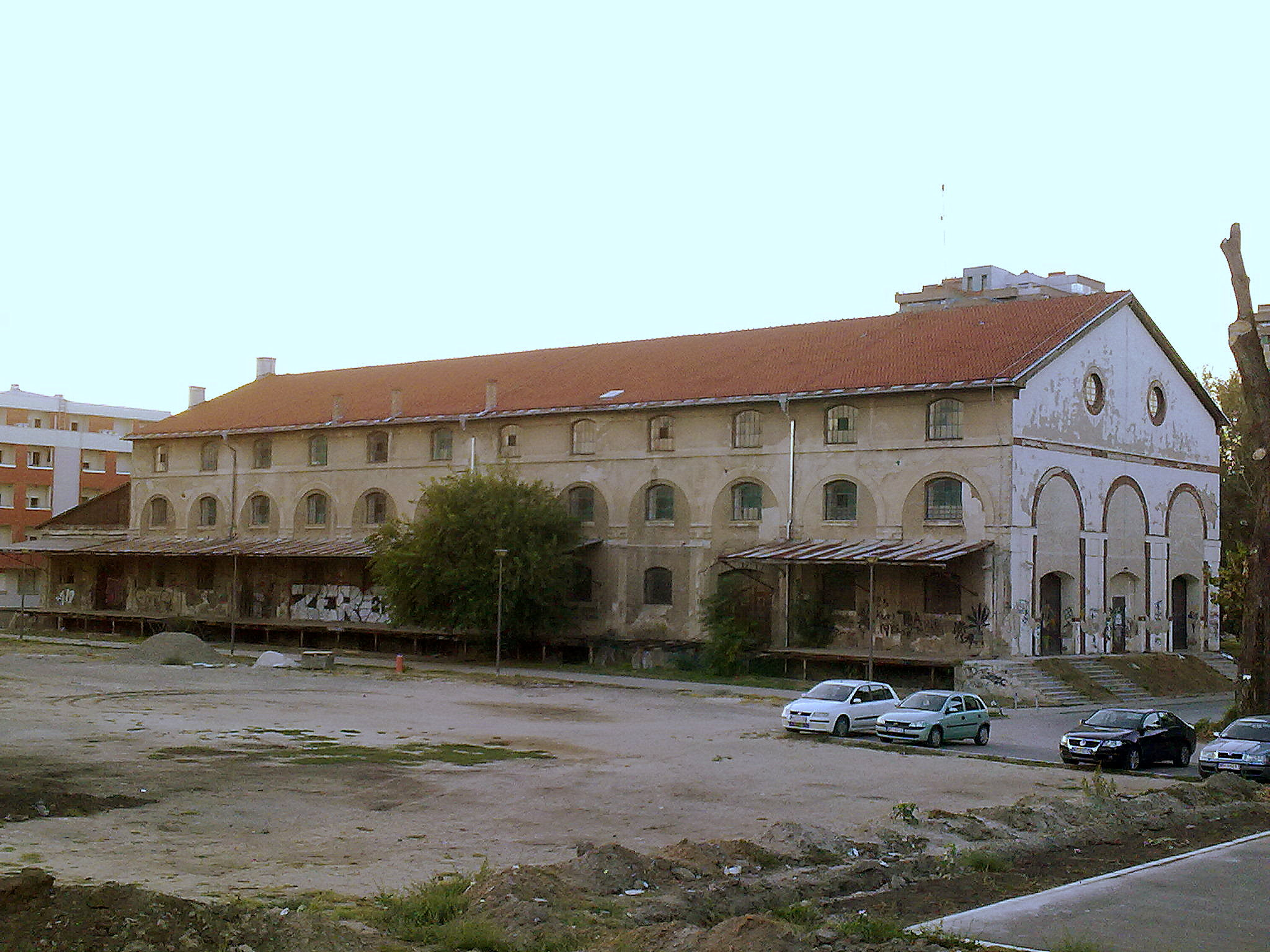 U nekadašnjoj industrijskog zoni Novog Sada na Limanu 3, nalazi se Češki magacin, izgrađen 1921 godine. Koristili su ga čehoslovački privrednici za lagerovanje uglavnom poljoprivrednih proizvoda koje su kupovali u Vojvodini i Dunavom transportovali na sever. Iz Česke su dovozili industrijsku robu za potrebe "Jugočeške", velike jugoslovensko-češke tekstilne firme. U jednom delu Češkog magacina nalazi se ranije popularan klub NS Time, u središnjem delu kluba postavljen je avion MIG-21.